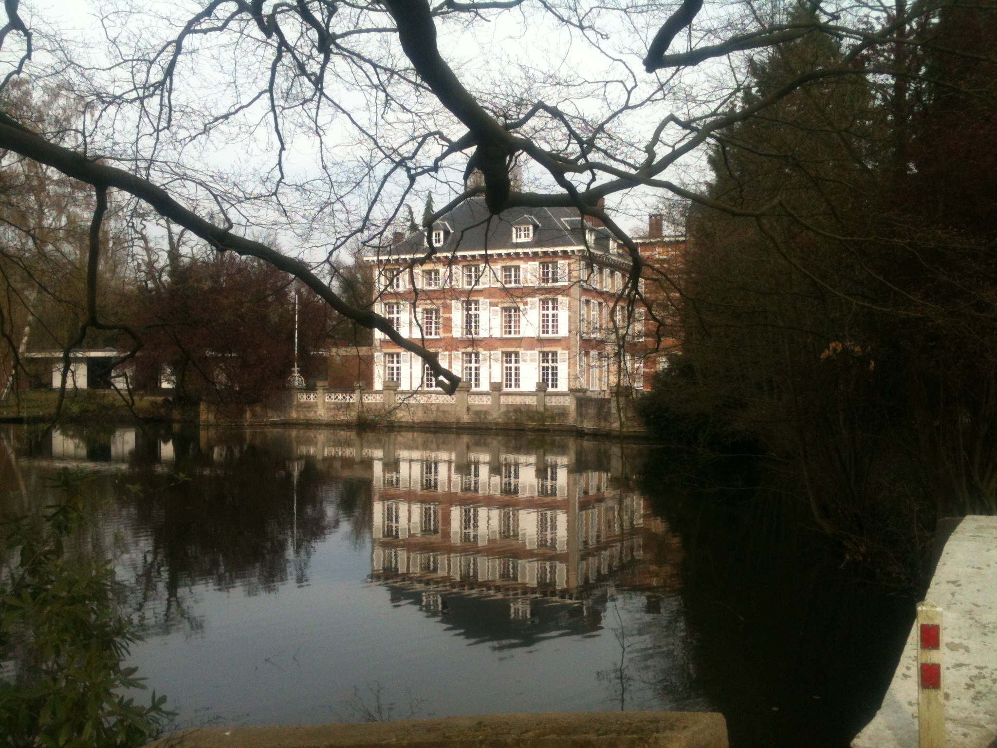 Kasteel de Bist